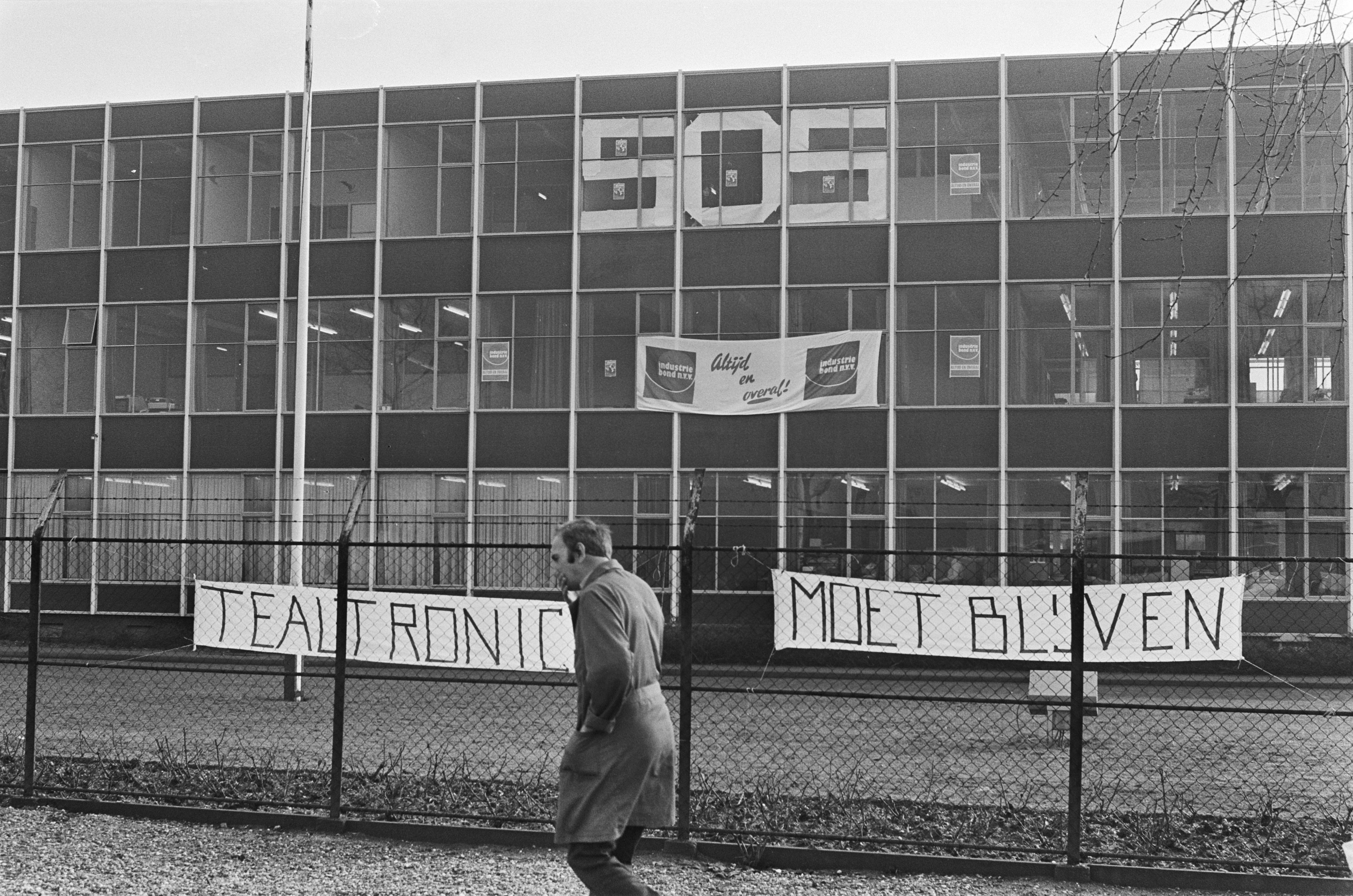 Collectie / Archief : Fotocollectie Anefo Reportage / Serie : [ onbekend ] Beschrijving : Bezetting bedrijf Tealtronic; het gebouw met spandoeken Datum : 7 januari 1977 Trefwoorden : BEZETTING, SPANDOEKEN, bedrijven, gebouwen Fotograaf : Peters, Hans / Anefo Auteursrechthebbende : Nationaal Archief Materiaalsoort : Negatief (zwart/wit) Nummer archiefinventaris : bekijk toegang 2.24.01.05 Bestanddeelnummer : 928-9684